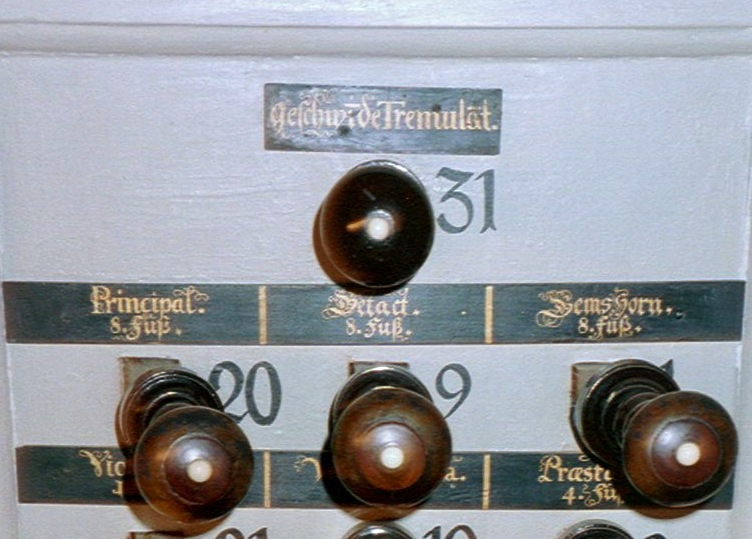 Registerzug "Geschwinder Tremulant" Herbstorgel Lahm